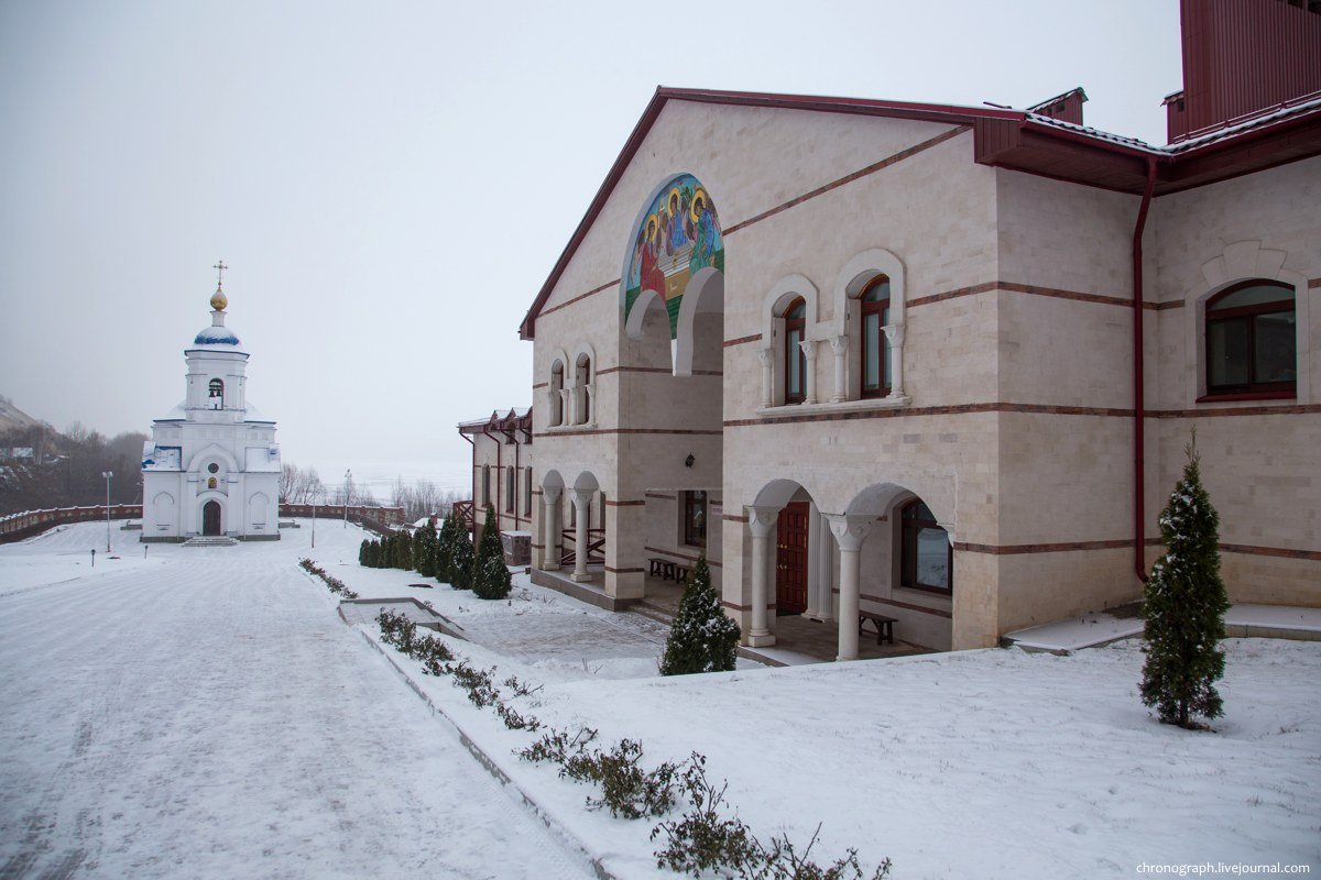 Внутренняя территория. Свято-Богородицкий Казанский мужской монастырь. Винновка, Ставропольский район Самарской области